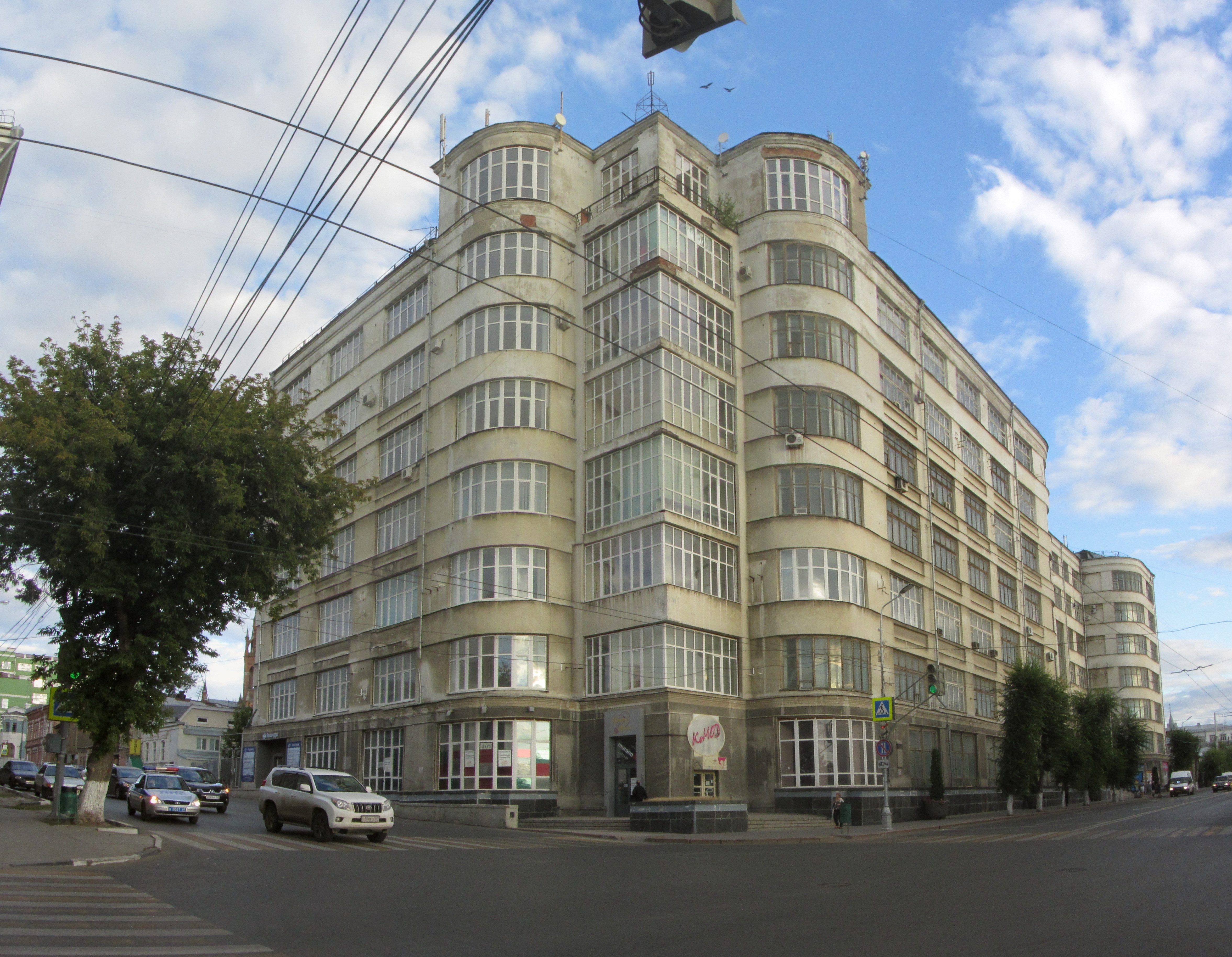 Дом промышленности: улица Куйбышева, 145, Самара, Самарская область